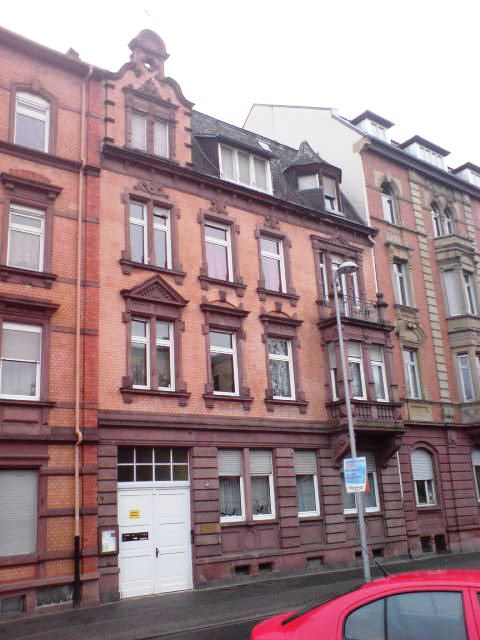 Mennonitengemeinde Ludwigshafen, Rheinland-Pfalz, Deutschland / Germany. Berliner Str. 43, Ludwigshafen